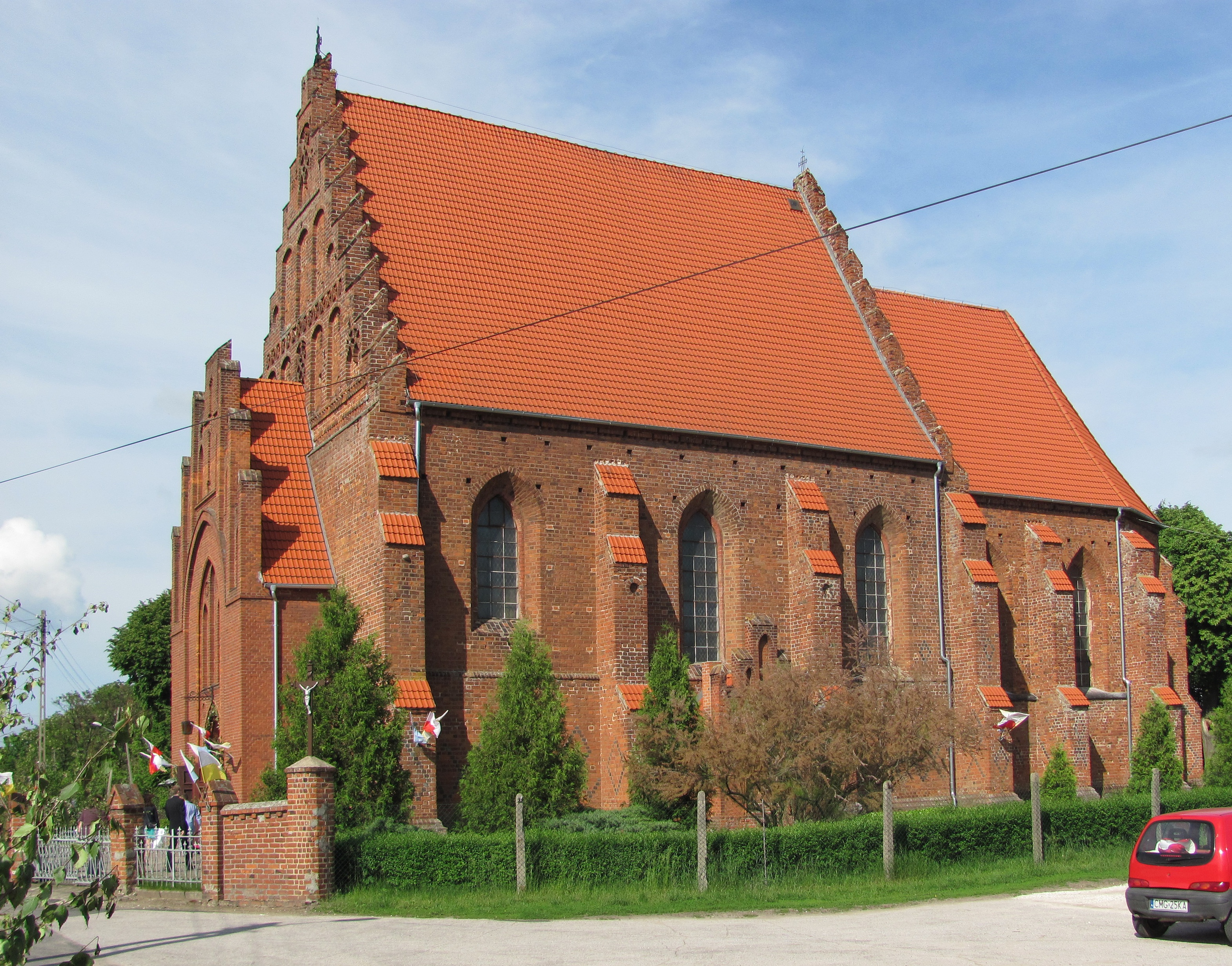 Gębice, kościół par. p.w. św. Mateusza, XV/XVI